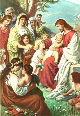 Lasset die Kindlein zu mir kommen